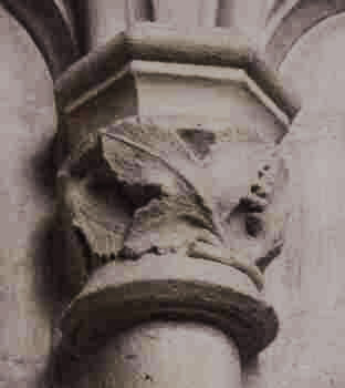 Un chapiteau de la cathédrale de Lisieux dans la chapelle de la Vierge Auteur : Osbern Date : 2001